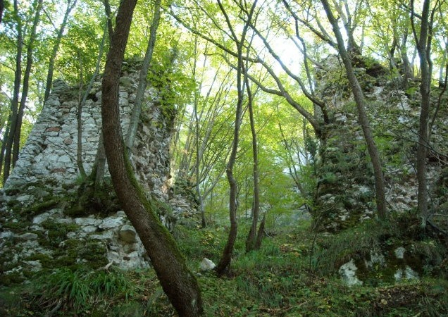 Стари град на саставцима Паљанске и Мокрањске Миљацке